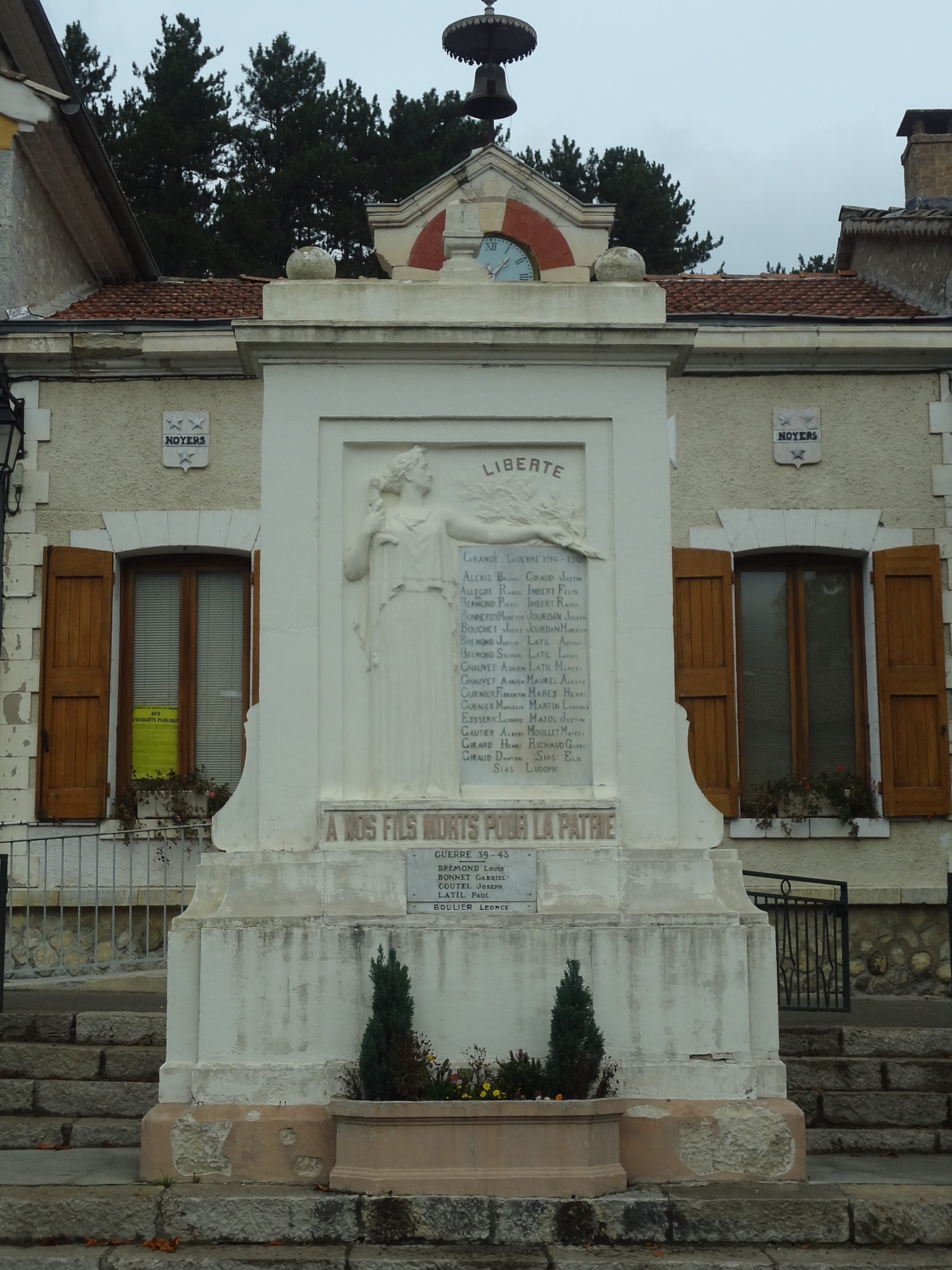 monument aux morts de la Première Guerre mondiale (1914-1918) de Noyers-sur-Jabron. Sculpture de Louis Maubert.